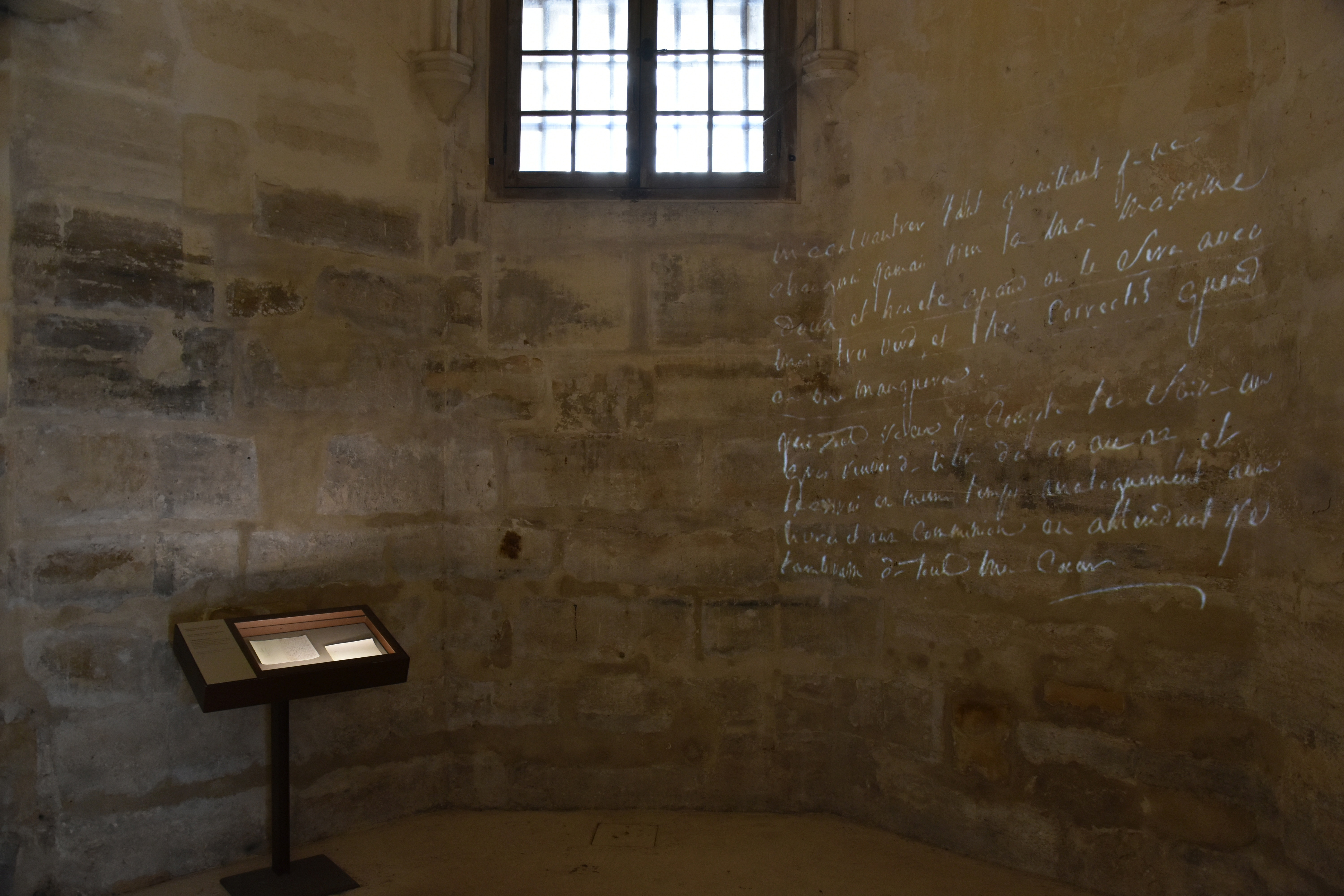 Cel van Markies de Sade Kasteel van Vincennes 27-02-2019